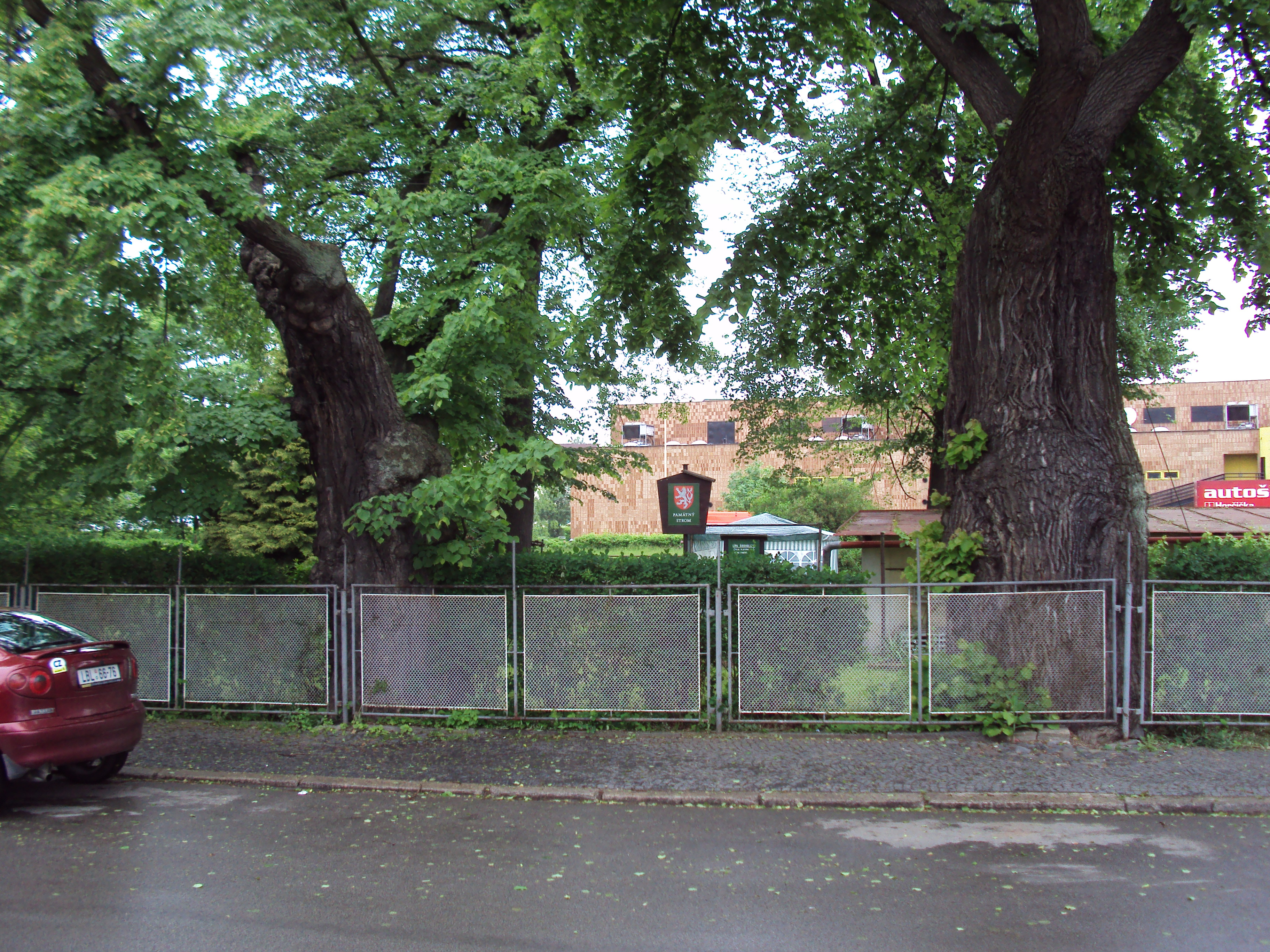 Chráněné lípy ve středu města u kostela Maří Magdaleny